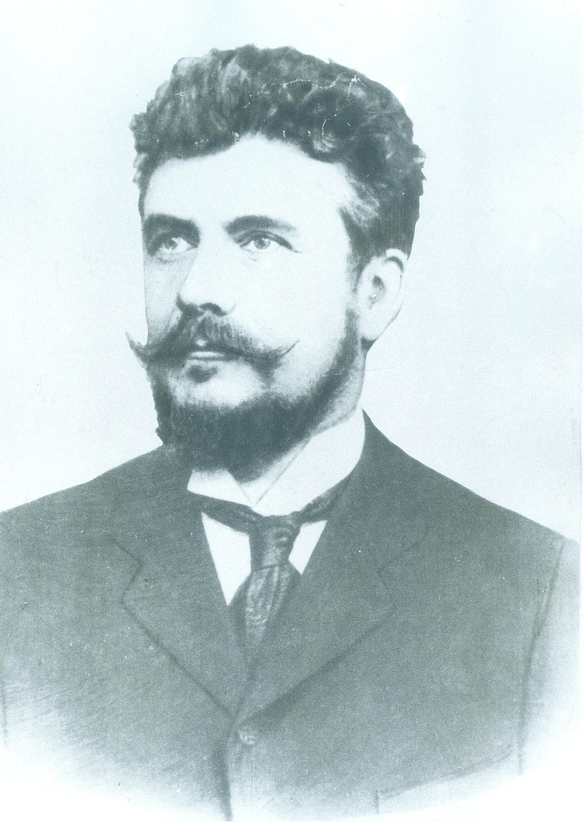 Dimitrie Onciul, Director General al Arhivelor Statului în perioada 1900-1923.